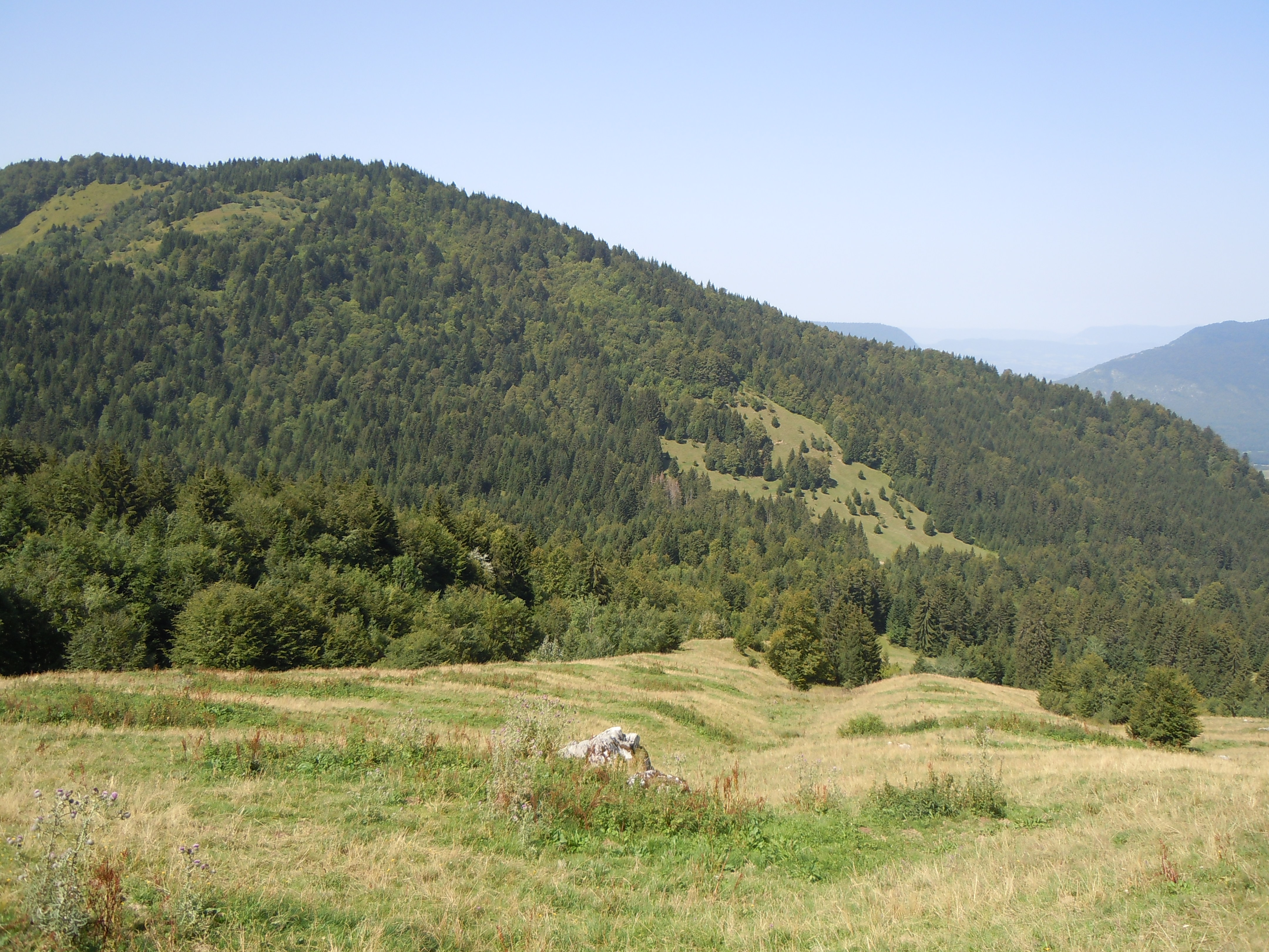 Vue du Mont Julioz depuis le chalet du Golet de Doucy.